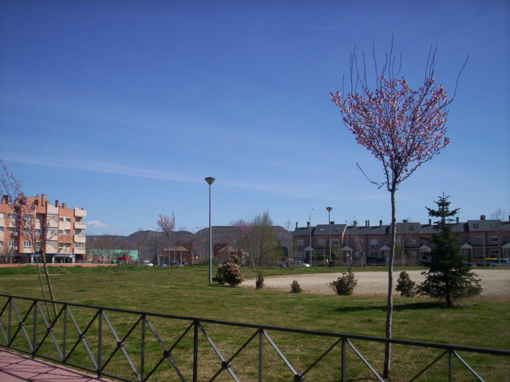 Cerros de Alcalá desde el parque de los jesuitas en el Ensanche